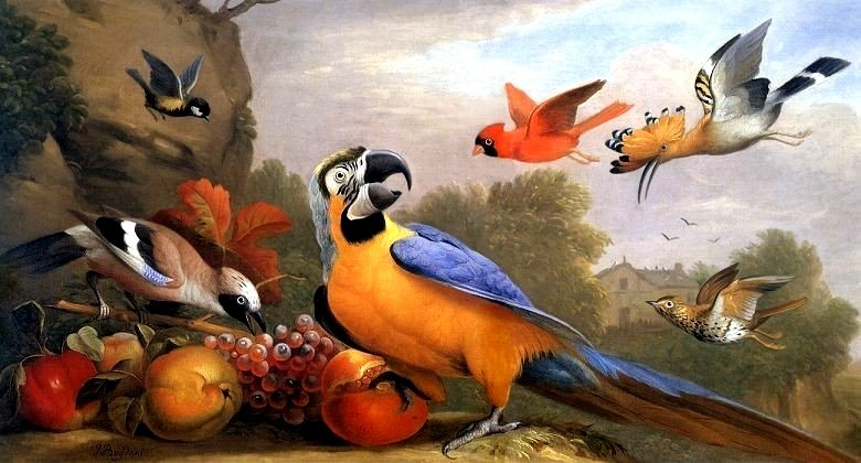 autor fotografie neznámy, digitalizácia zo starých prospektov